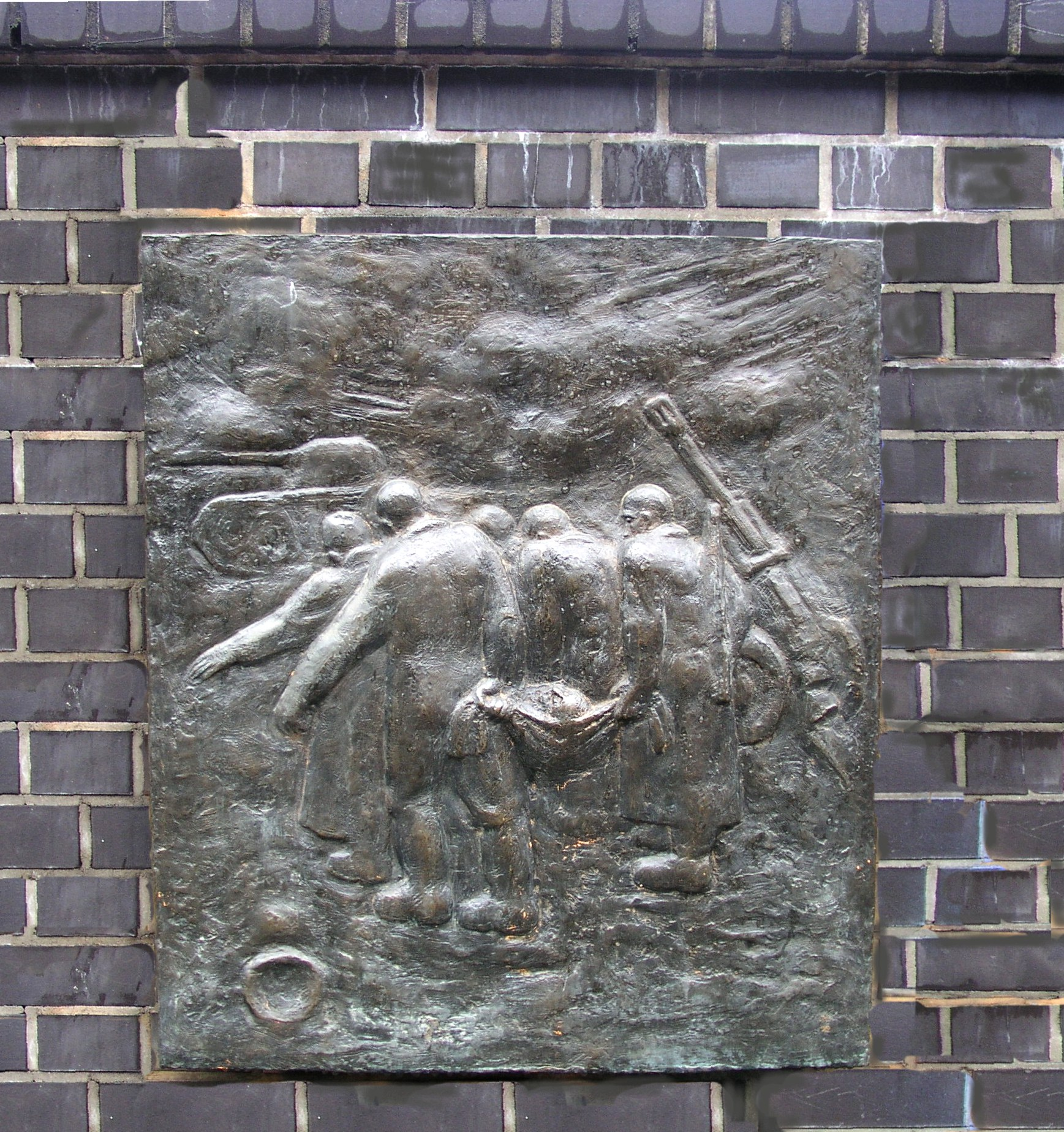 Teil (1) einer Gedenktafelserie auf der Straßenbrücke Schönhauser Allee von Günter Schütz, DDR 1985/86